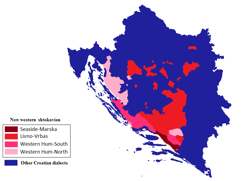 Novoštokavska ikavica